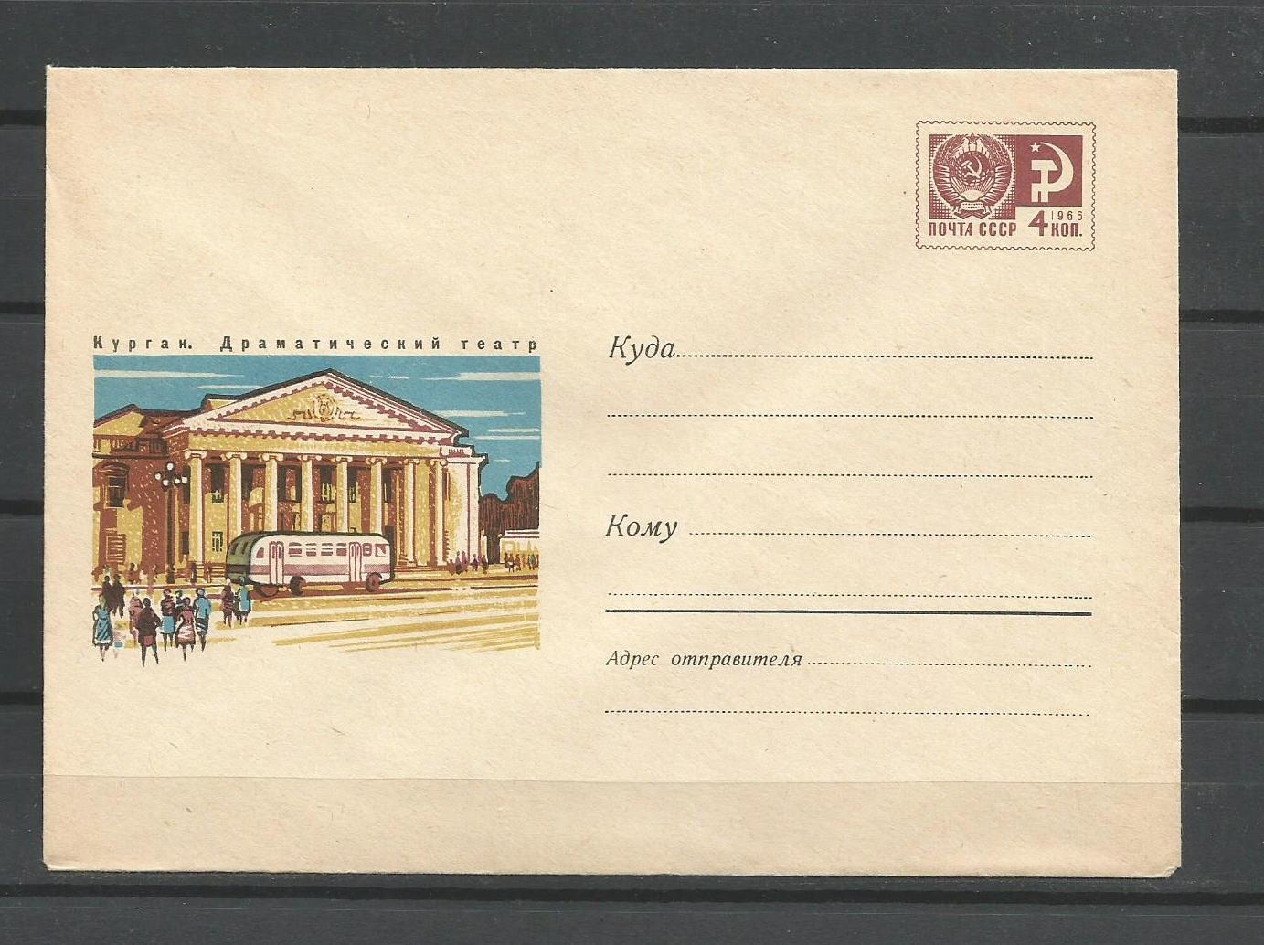 Курганский драматический театр, почтовый конверт